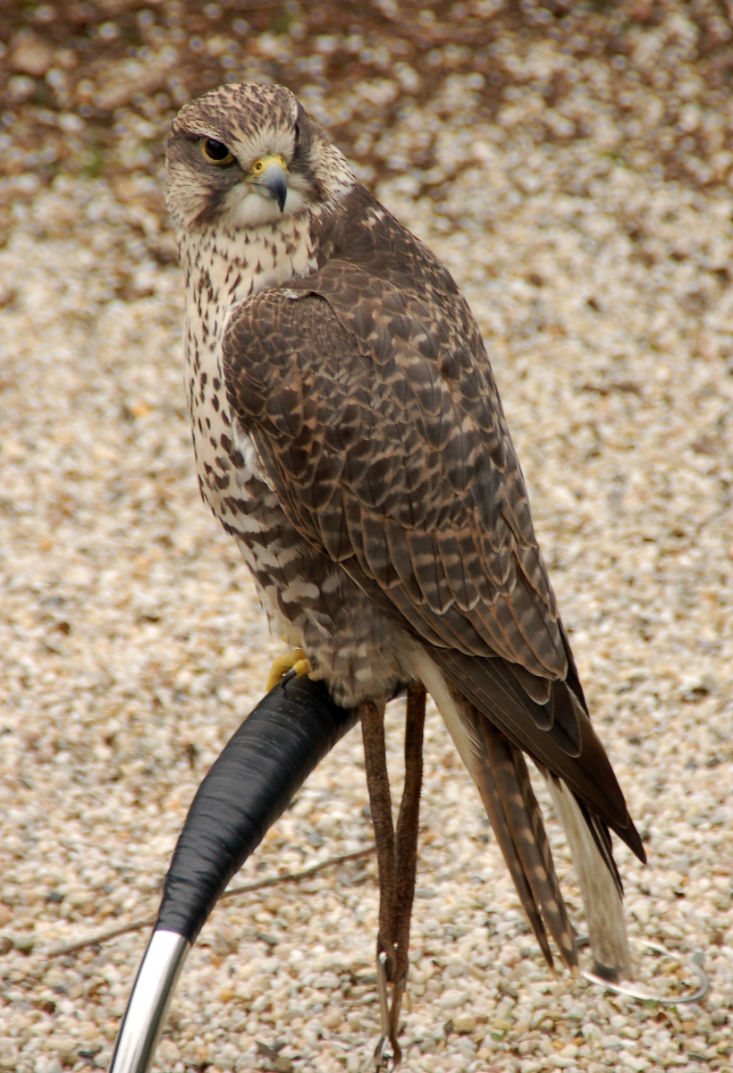 Sakerfalke Falco cherrug, Tierpark, Bochum, Deutschland